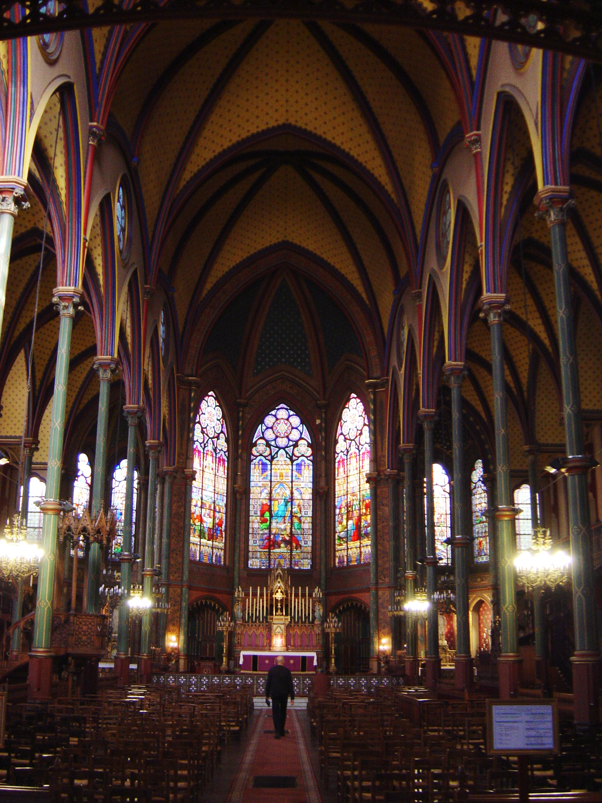 église Saint-Eugène-Sainte-Cécile à Paris, vue vers le choeur